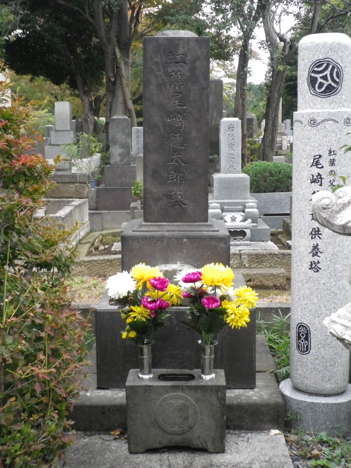 尾崎紅葉の墓